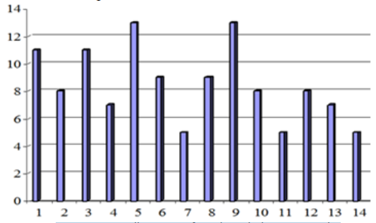 qrafik